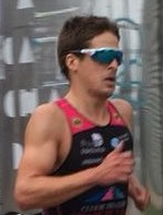 Foto del triatleta Pablo Dapena